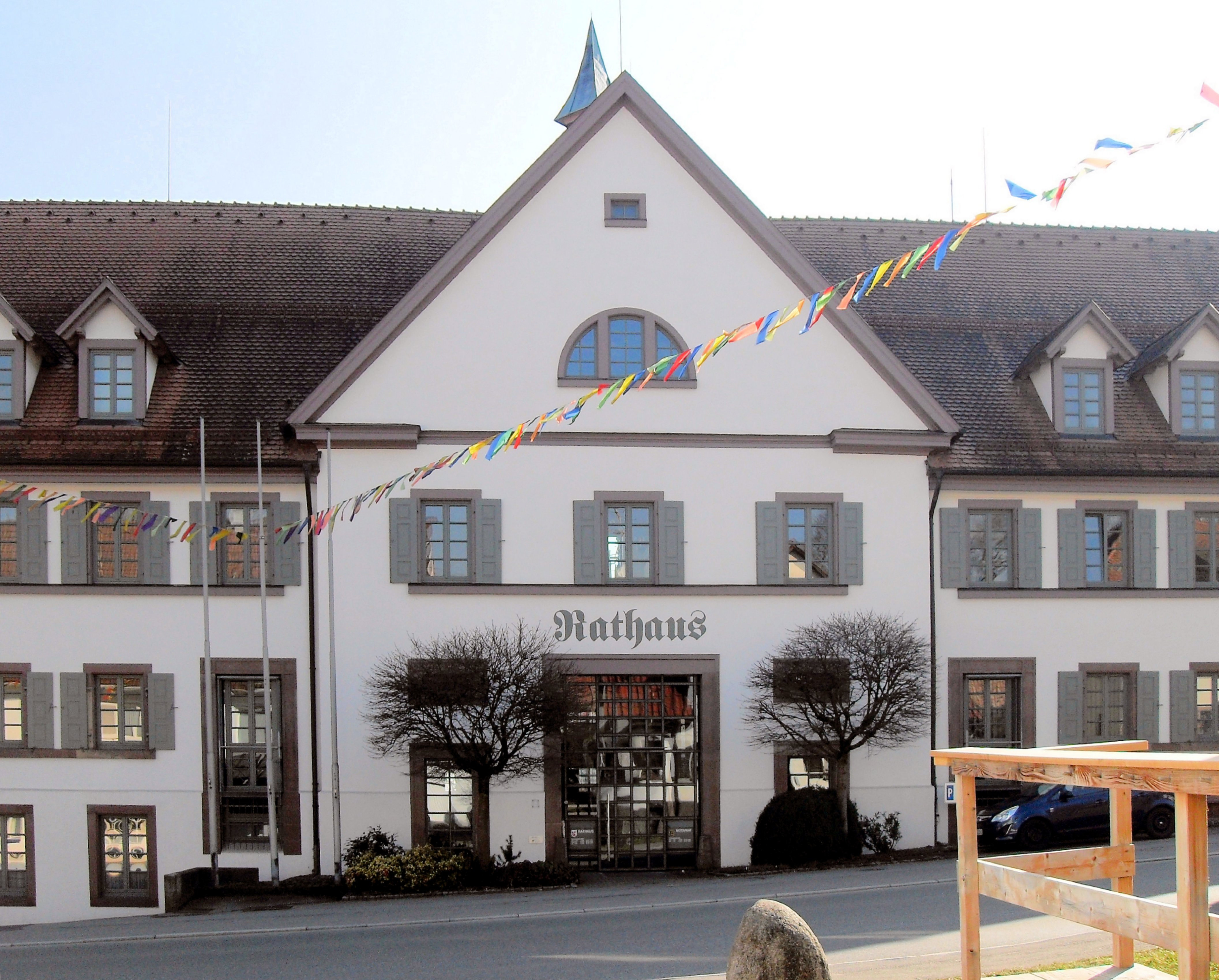 Rathaus mit Heimatmuseum in Dunningen